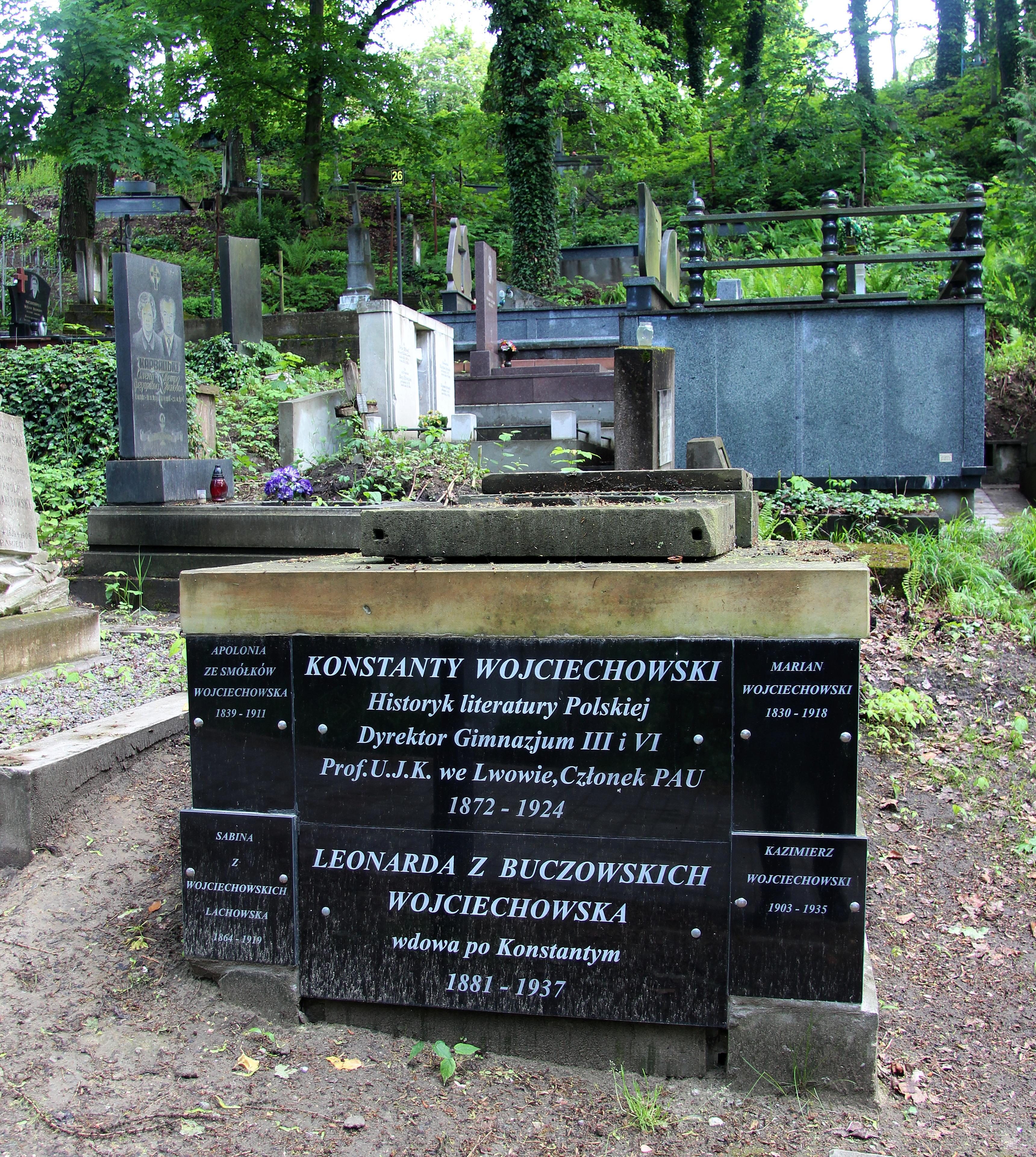 Гробівець родини Войцеховських. Личаківський цвинтар , поле 26-28.